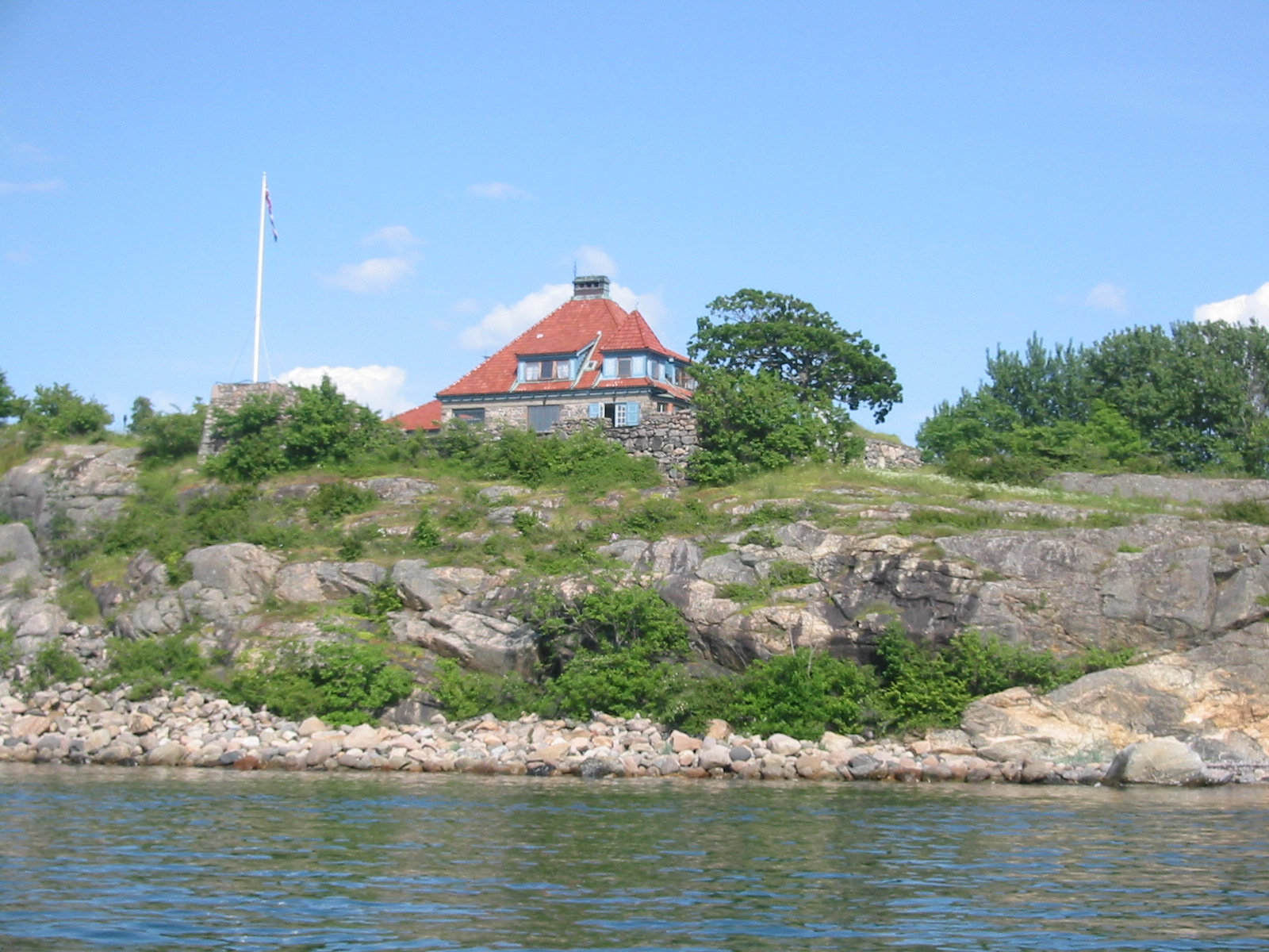 Fredriksodde anno 2003